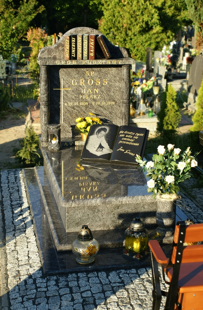 Nagrobek fraszkopisarza Jana Grossa. Grób znajduje się w Alei Zasłużonych na cmentarzu w Gorzowie Wielkopolskim